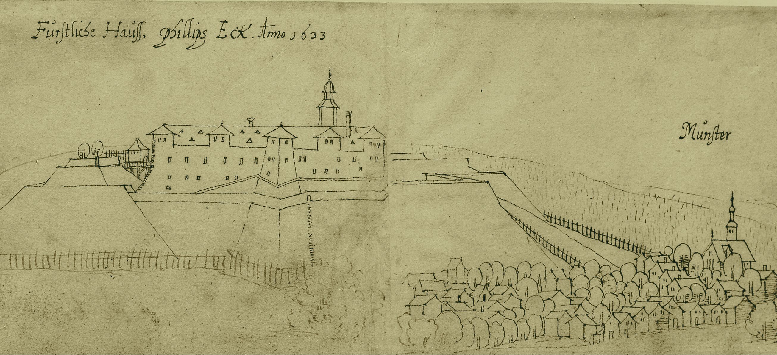 Ansicht des festungsartig ausgebauten Schloss Philippseck bei Butzbach-Münster, bez. oben links Fürstliche Hauss philipps Eck Anno 1633.